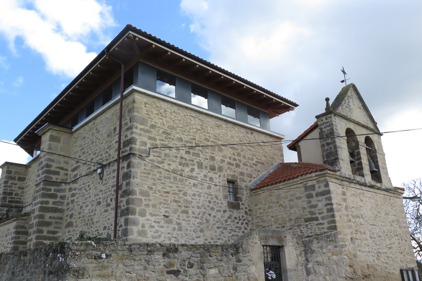 Torre e Iglesia de Molinilla (Lantarón), Álava (España)